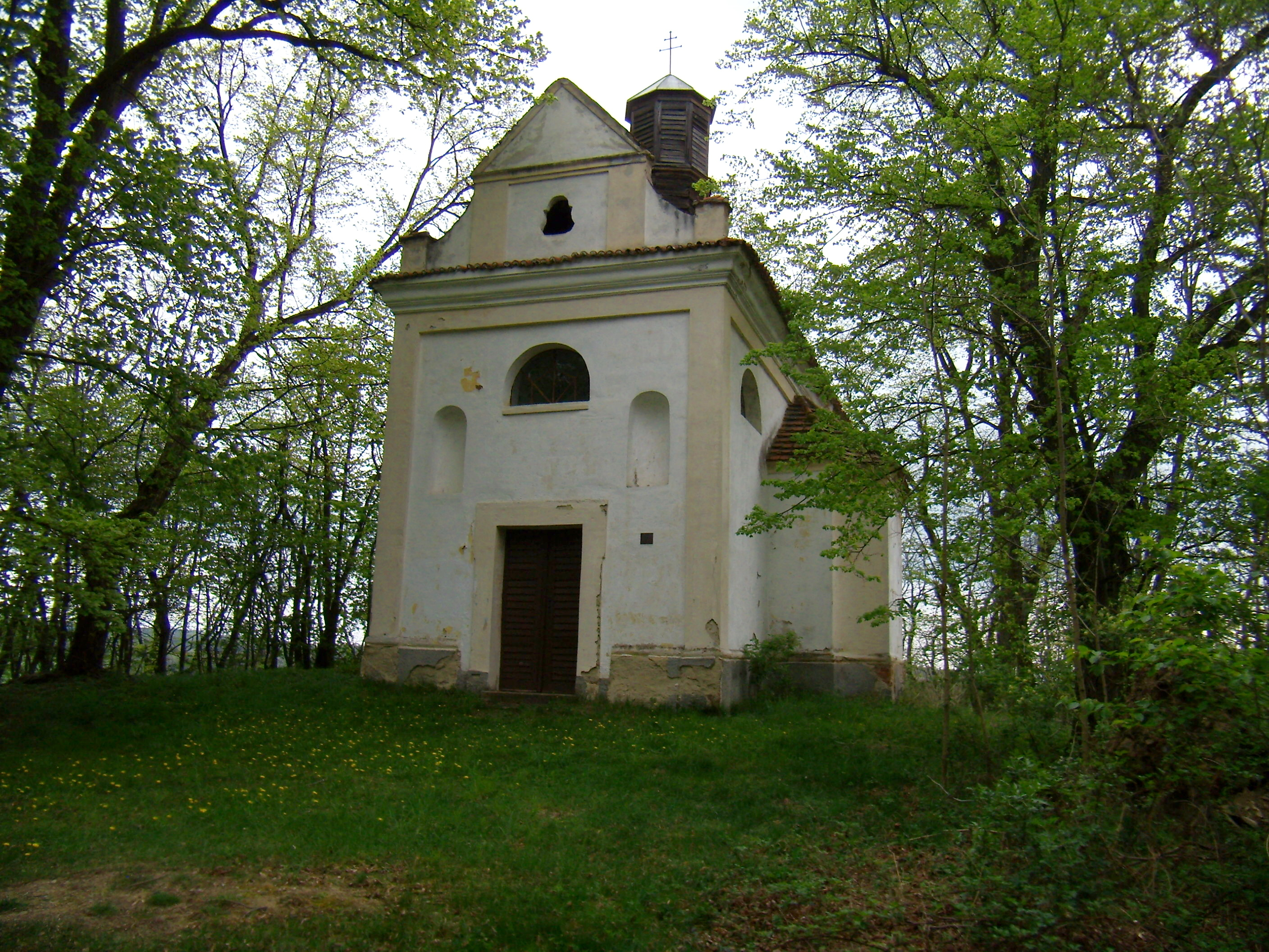 Roupov - kaple sv. Anny